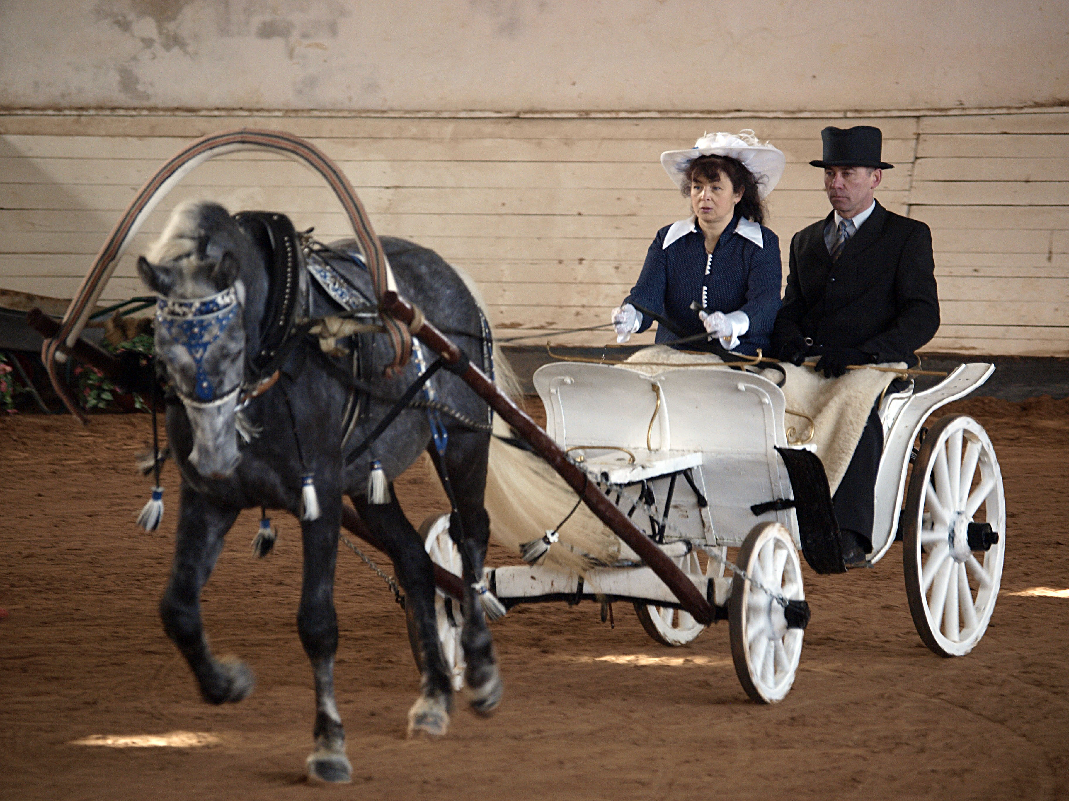 Sport centre KLEISTI, Riga, Latvia